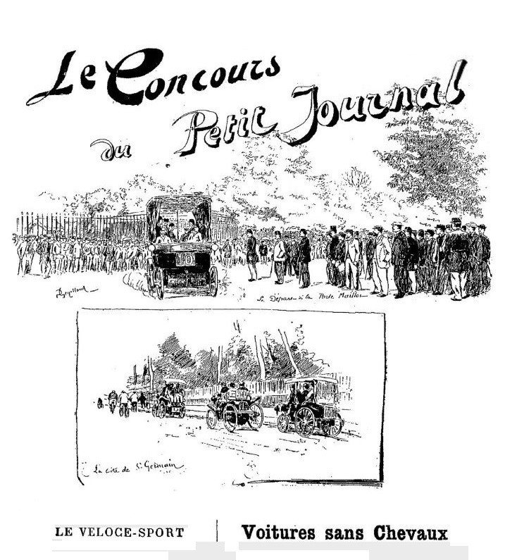 Dessin en hommage au Paris-Rouen 1894 du Petit Journal, par Le Véloce Sport du 26 juillet 1894, accompagnant le court article de Montyvalent "Voitures sans Chevaux" (Le Véloce-sport du 26 juillet 1894, p.637)